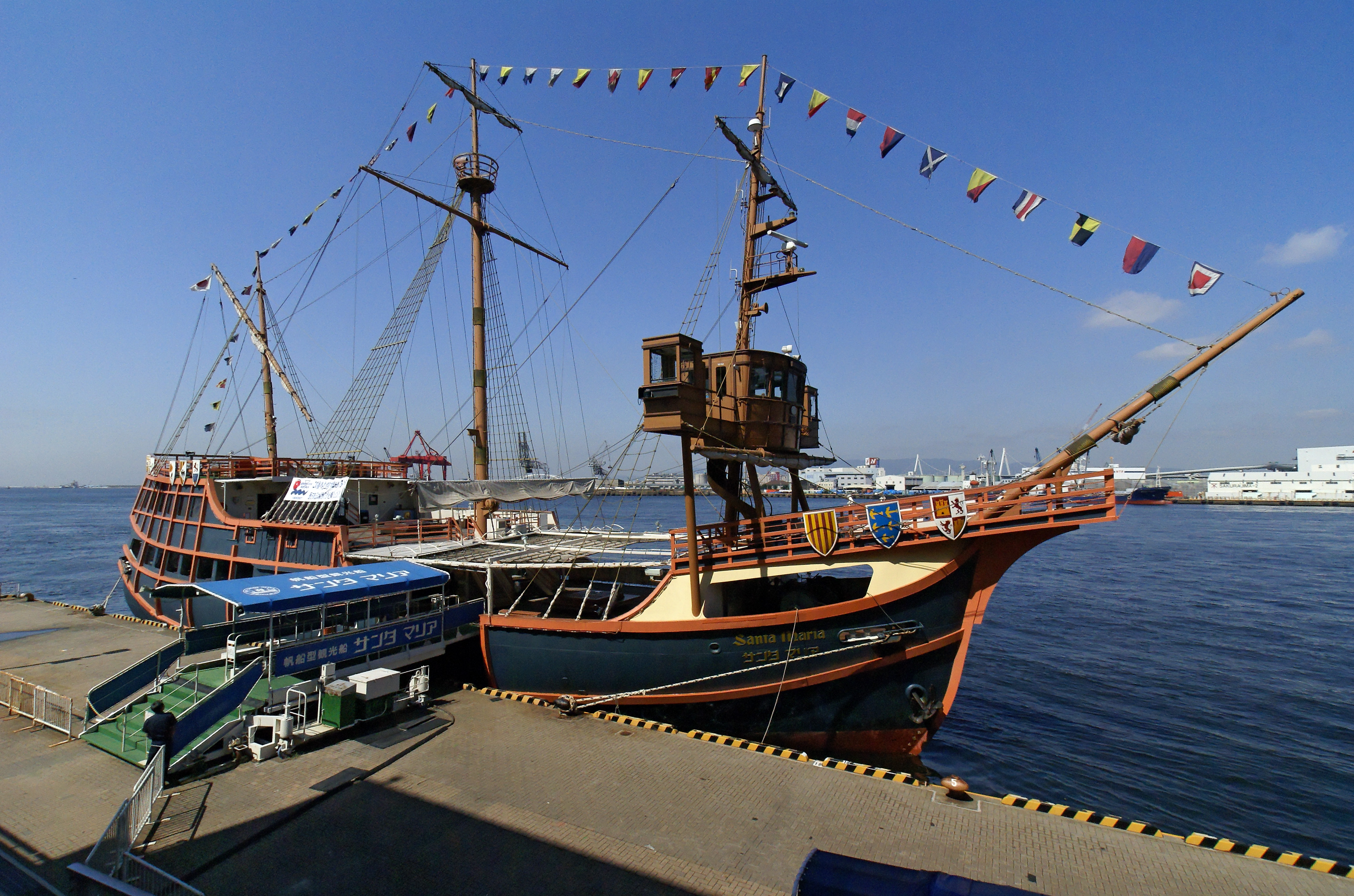 Passenger ship "Santa María" in Osaka, Osaka prefecture, Japan